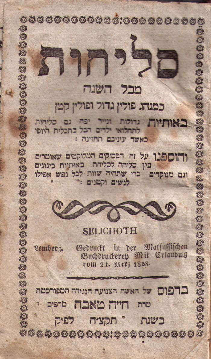 Slichot - Poland rite 1731